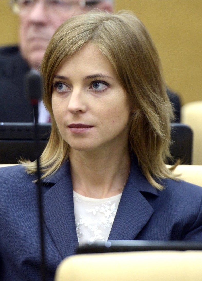 Депутат Госдумы РФ Наталья Поклонская на первом заседании Государственной Думы Федерального Собрания Российской Федерации седьмого созыва